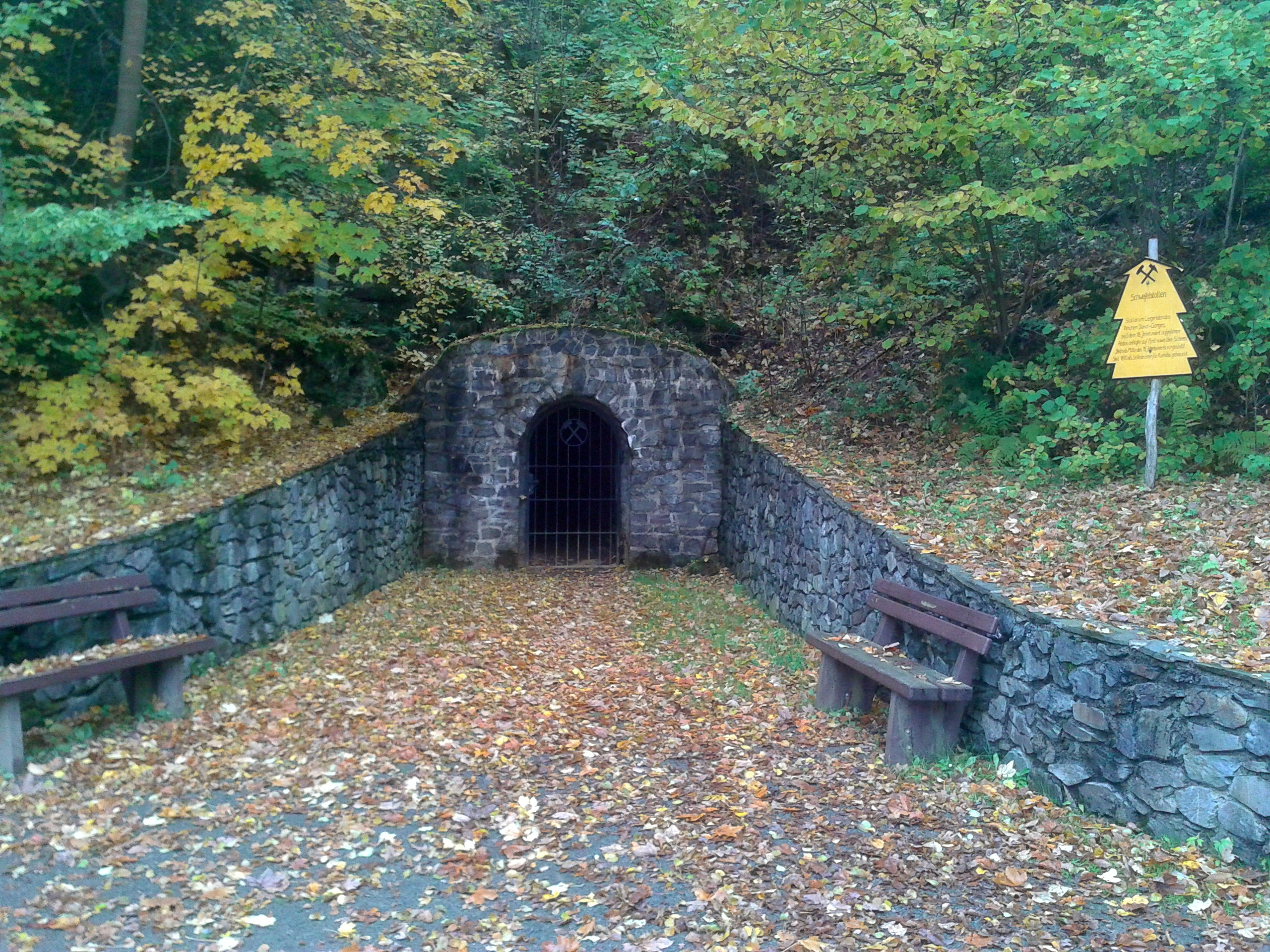 Schwefelstollen in Alexisbad mit rechtsseitig erkennbarer Bergbautanne